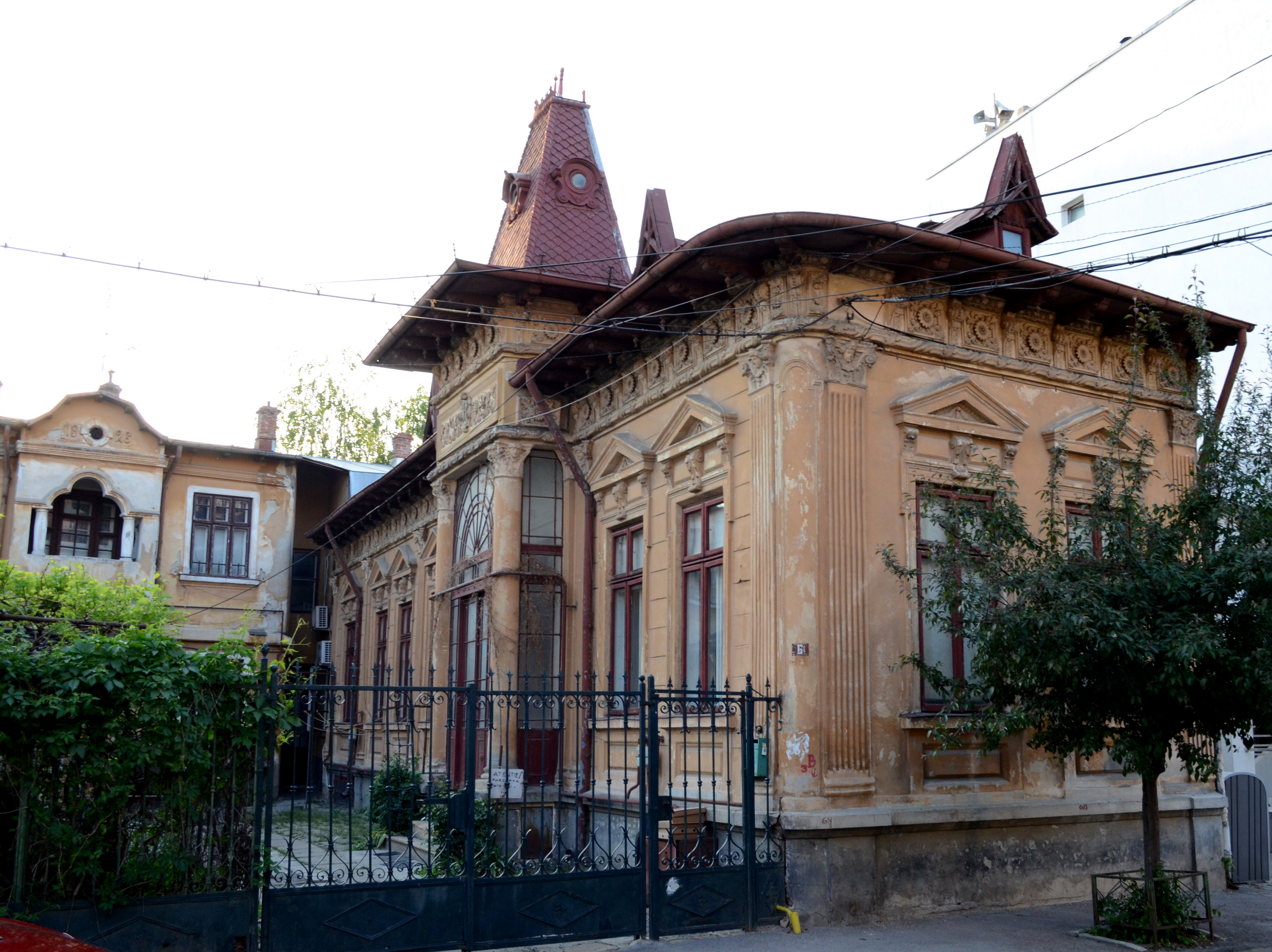 Casă, Strada Parfumului nr. 6, Sector 3, București